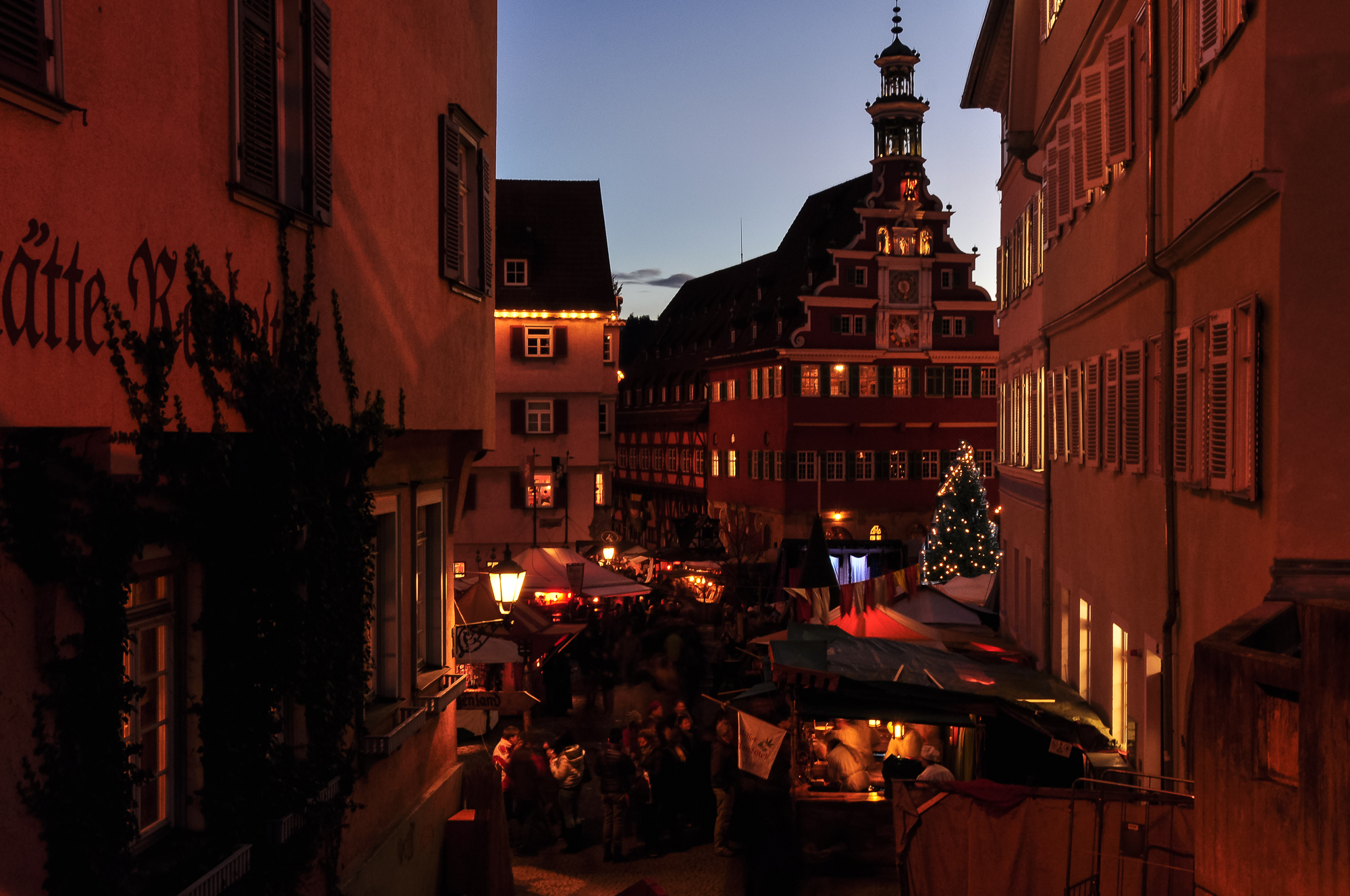 Der Esslinger Weihnachtsmarkt ist besonders, weil er mit einem Mittelalterlichen Markt kombiniert ist. Der Markt wird wieder zum Markt, nicht zur Verkaufsveranstaltung von Weihnachtsbedarf...